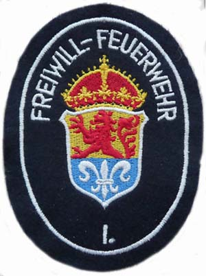 Ärmelanbzeichen der Freiwilligen Feuerwehr Darmstadt